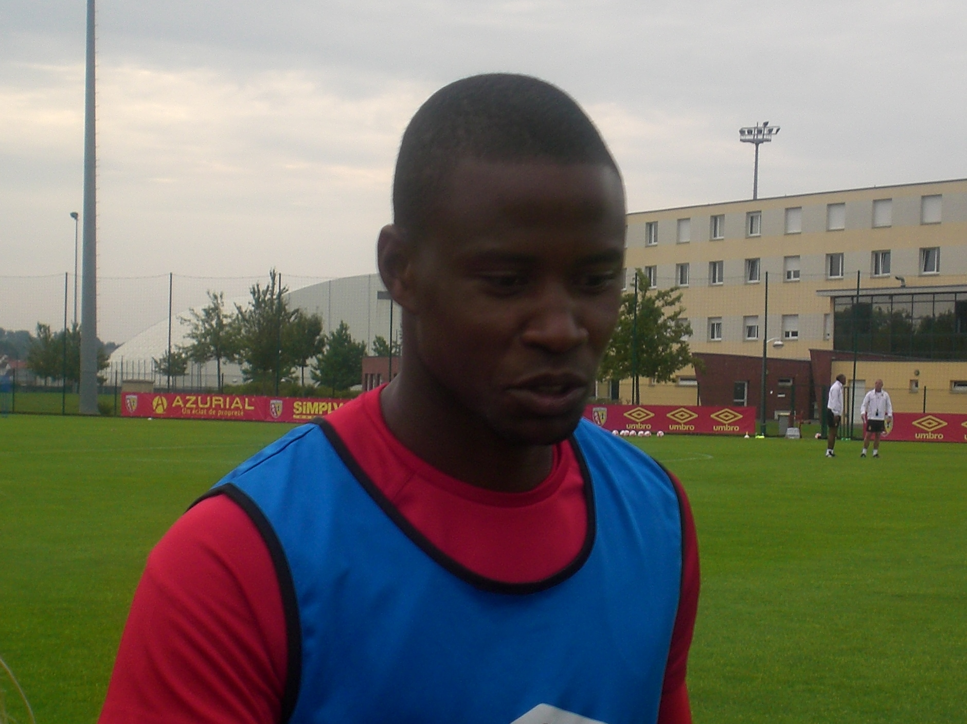 Deme N'Diaye lors d'un entraînement public du Racing Club de Lens, le 19 août 2015, au Centre technique et Sportif de La Gaillette.